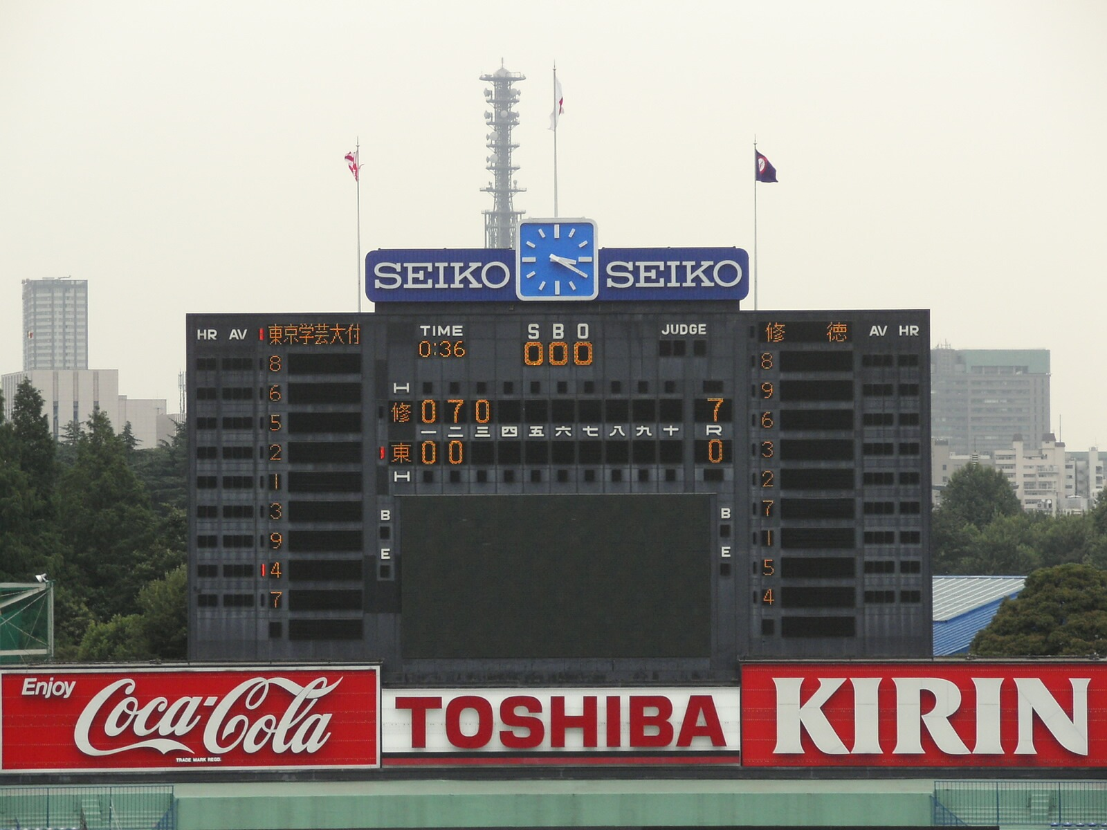 Meiji_Jingu_Stadium